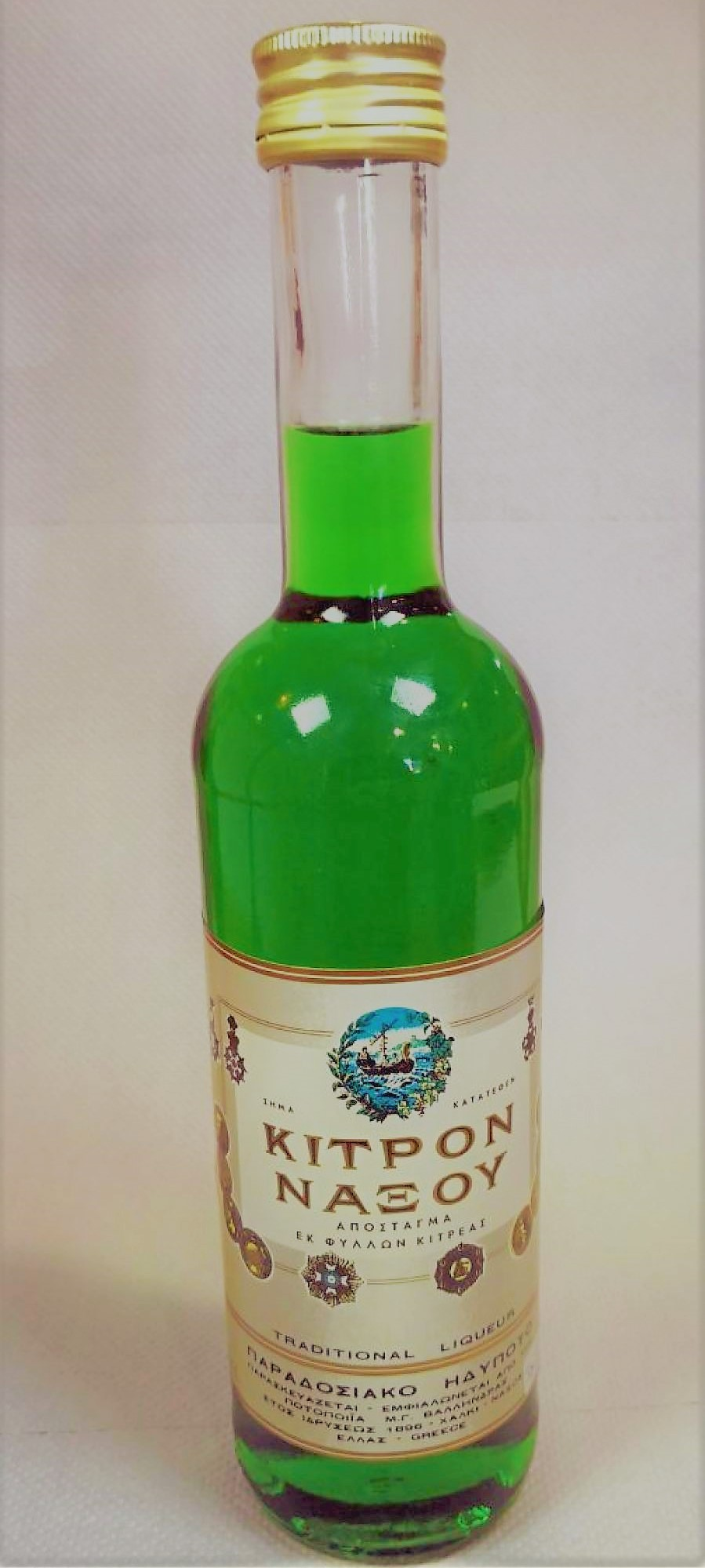 Bevanda alcolica, prodotta da foglie di cedro, tipica dell'isola greca di Nasso.